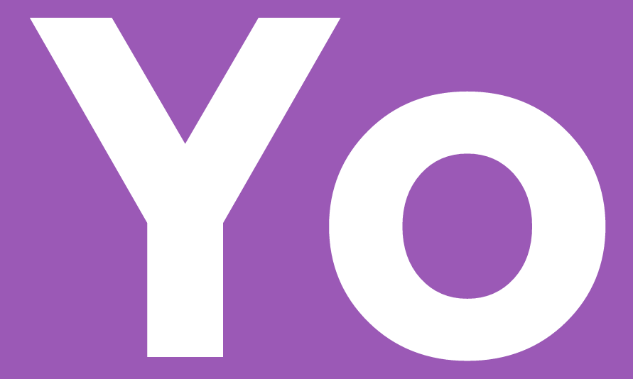 Yo isimli mobil uygulamanın logosu.